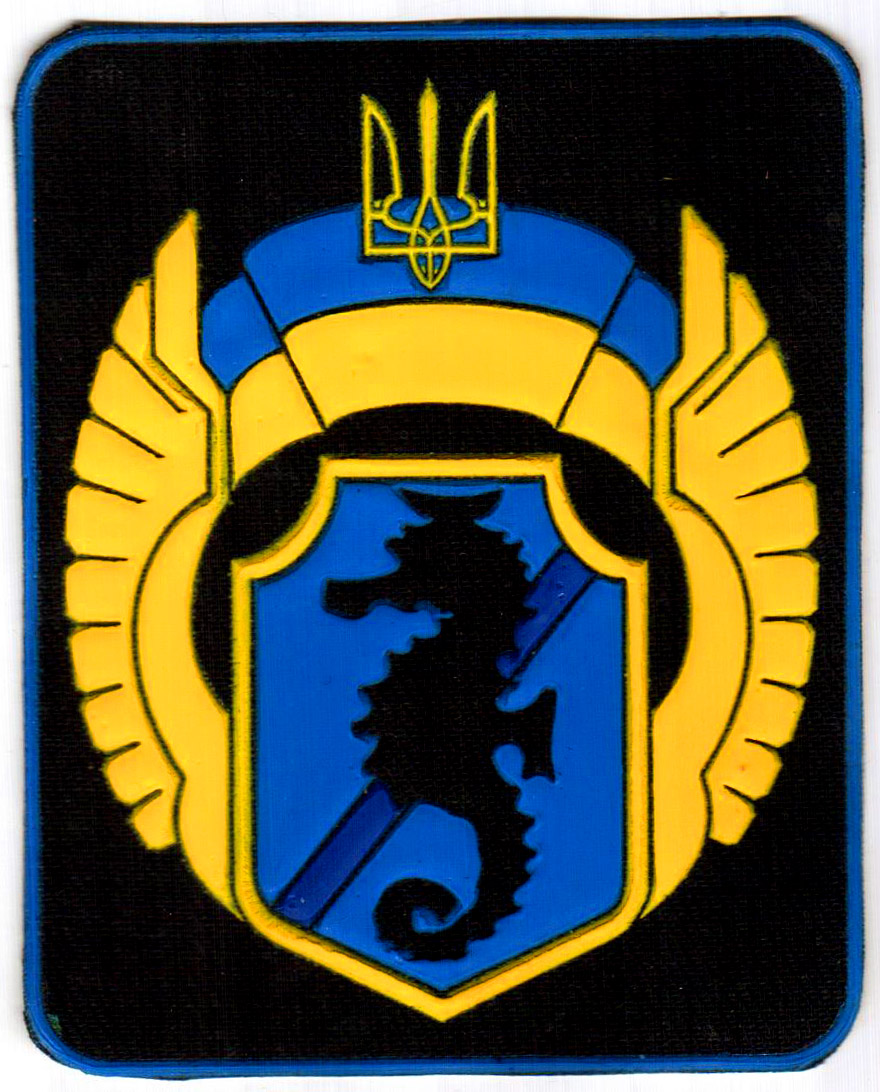 Нарукавний шеврон бойових підрозділів 73-го морського центру спеціального призначення.